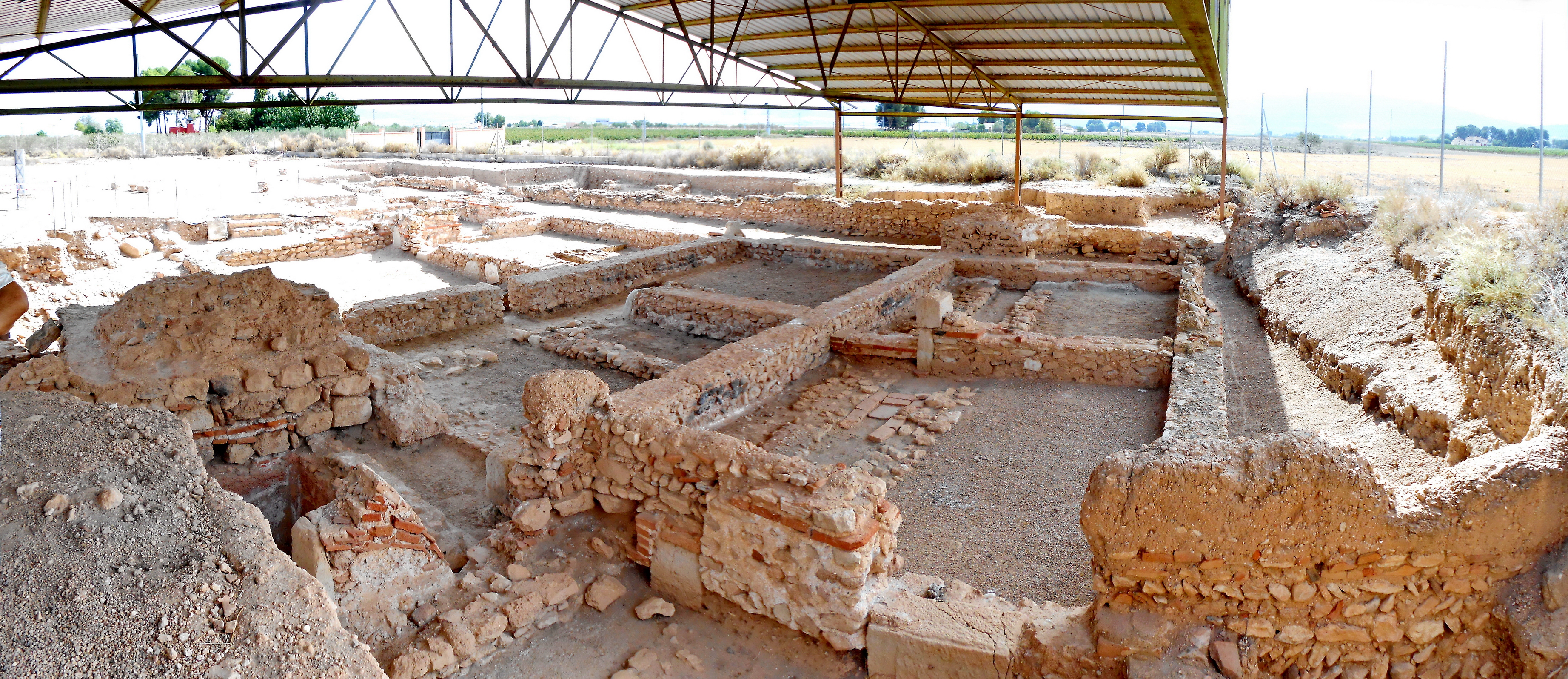 Los Torrejones Yecla, Murcia